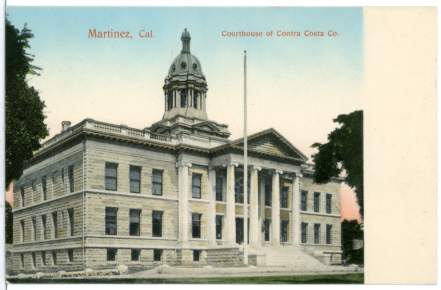 Martinez; Courthouse of Contra Costa Co. This postcard is from publisher Brück & Sohn in Meißen ( postcard has a unique number 06903 and is available in a higher resolution at the publisher. This images was uploaded in a cooperation project between Wikipedians and the publisher.